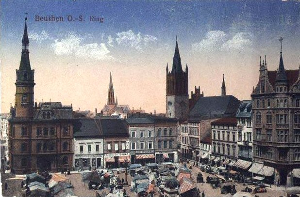 Rynek - pocztówka z ok. 1910 r.